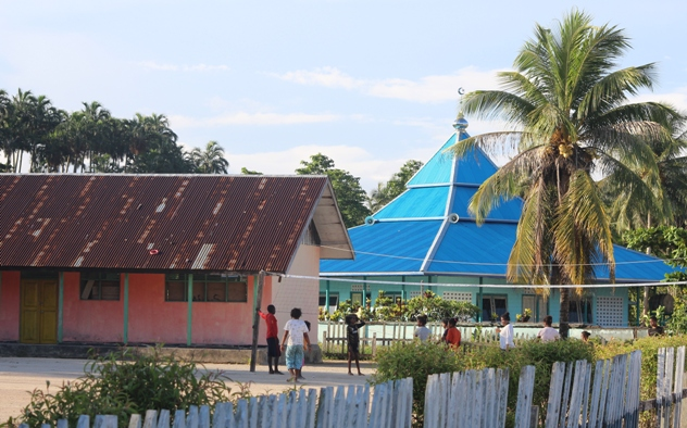 sekolah dan masjid di desa adi jaya